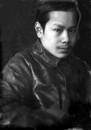 刘泽荣，广东广州市人。中国政治家。